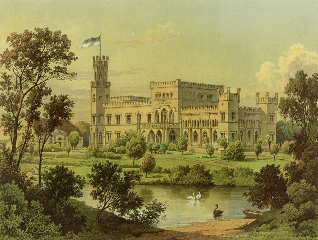 Schloss Simmenau, Provinz Schlesien, Kreis Creuzburg